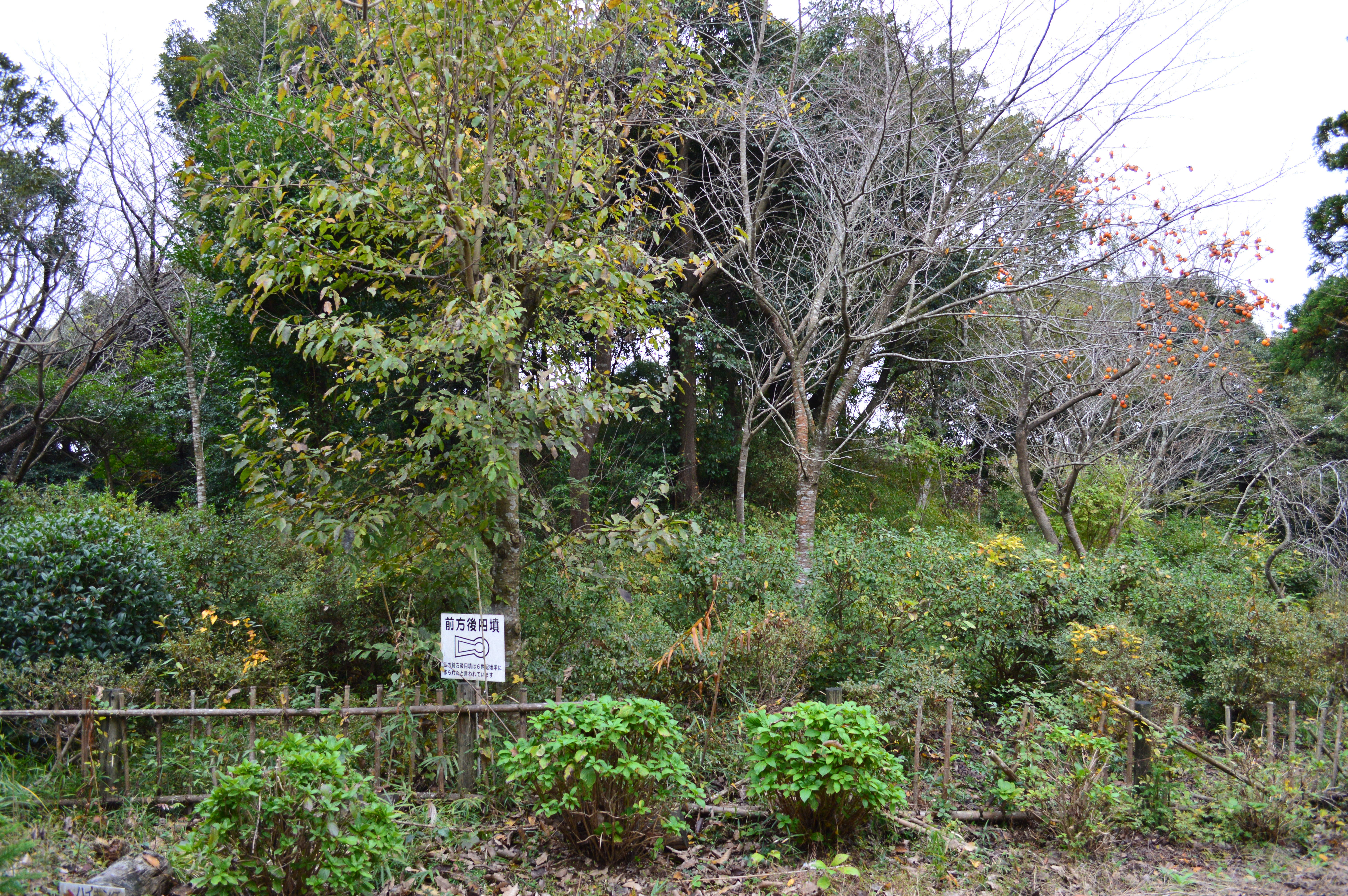 神道山古墳 (香取市)